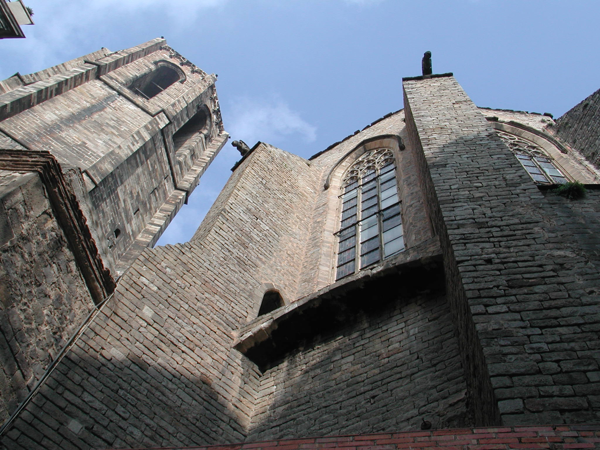 Santa María del Pí, Barcelona, esterno Barcelona